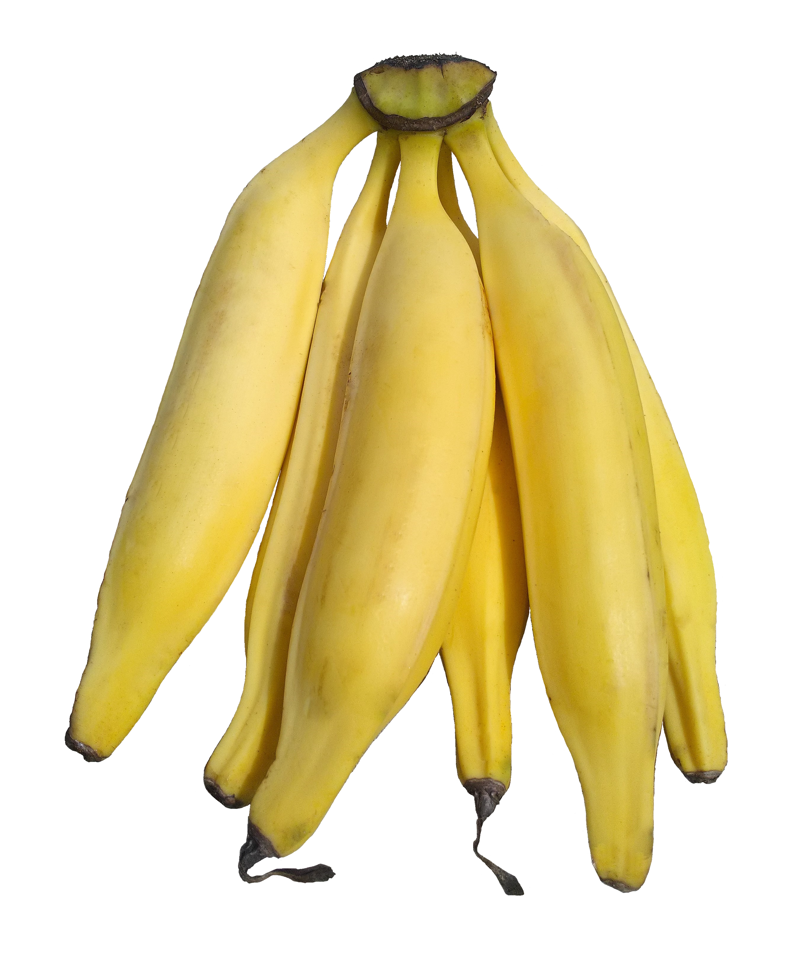 Bananes plantain sur fond blanc